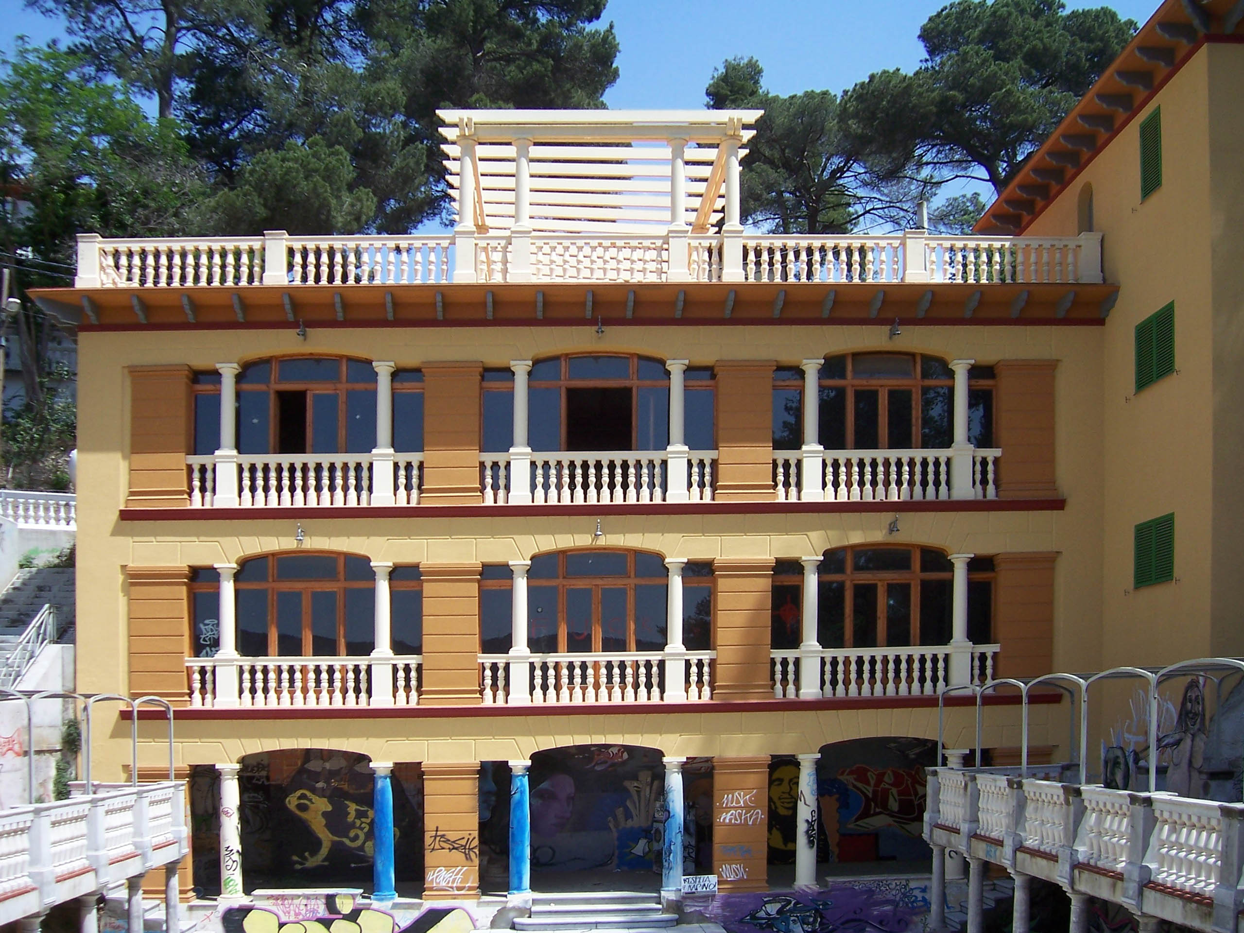 Façana del Casal de la Floresta